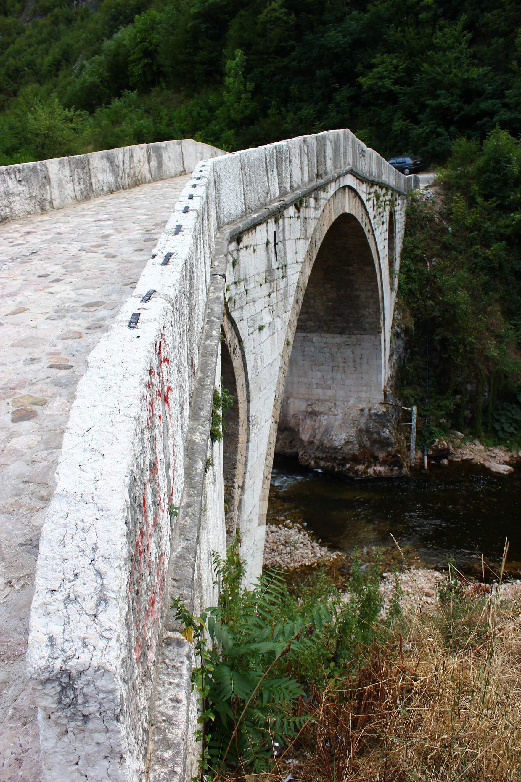 Die Ziegenbrücke über die Miljacka bei Sarajevo.Hornjoserbsce: "Kozacy móst" přez Miljacku pola Sarajewa.